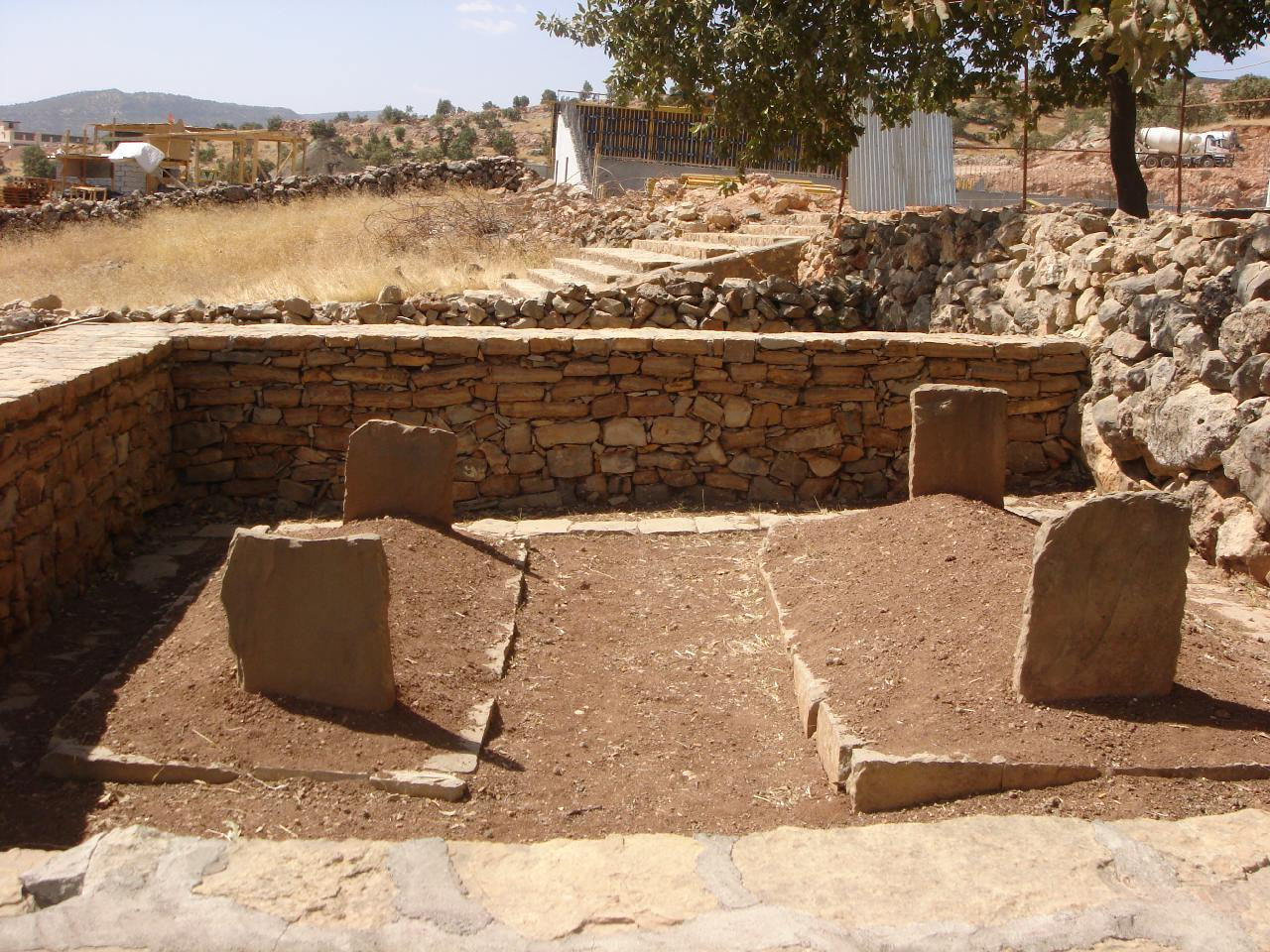 Gräber von Mustafa Barzani (rechts) und Idris Barzani (links)Kurdî: گۆڕەکانی مستەفا بارزانی (ڕاست) و ئیدریس بارزانی (چەپ) لە بارزاندا